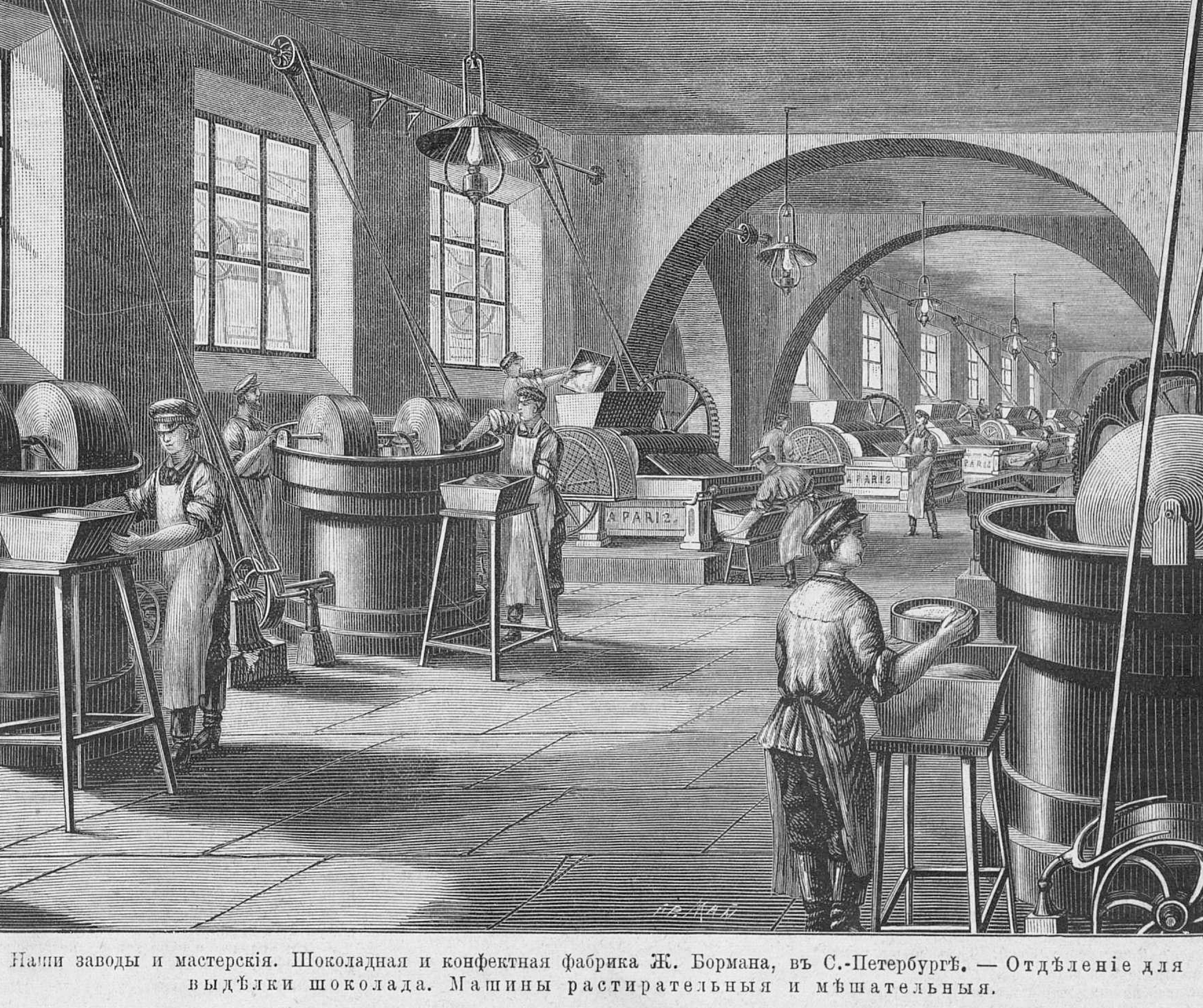 Шоколадная фабрика Бормана, Санкт-Петербург, 1882